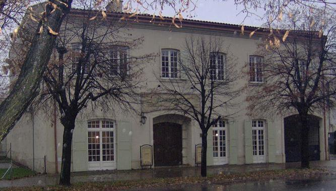 Kutno, ul. Barlickiego 20 - budynek starej gminy żydowskiej (obecnie restauracja "Rozmaryn") 06.1974.